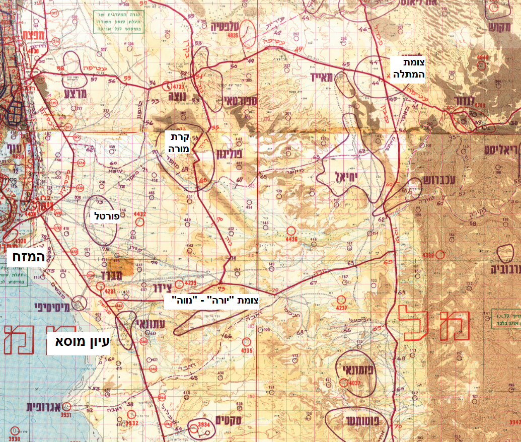 אזור ואדי מעבוק - מתוך מפת סיריוס מבוסס על מפת סיריוס - מלחמת יום הכיפורים ששוחררה בCC4